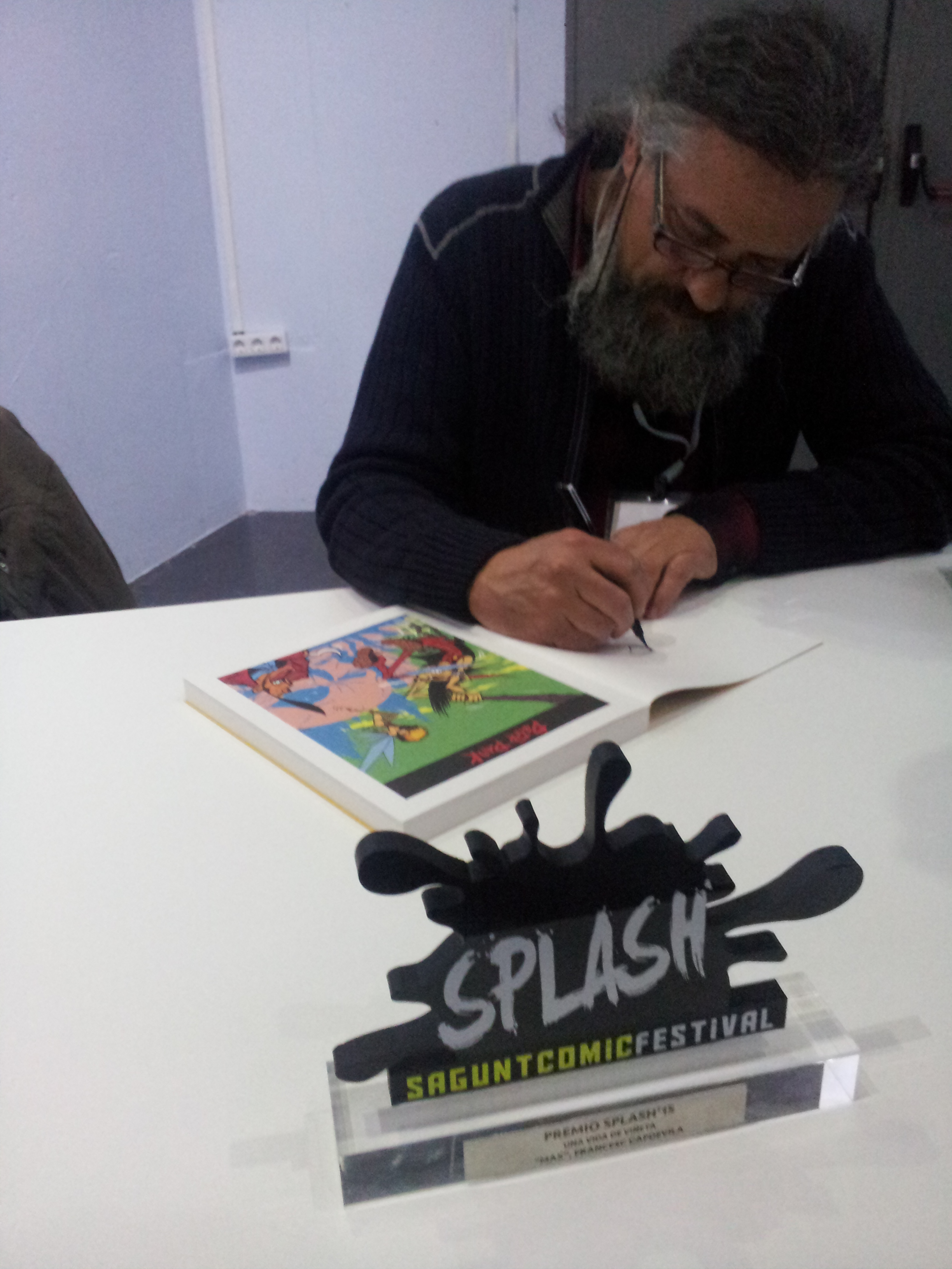 Festival de còmic Splash Sagunt 2015.